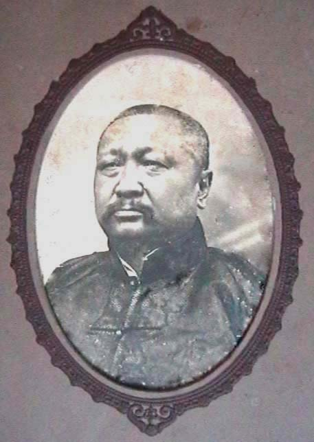 岑春煊